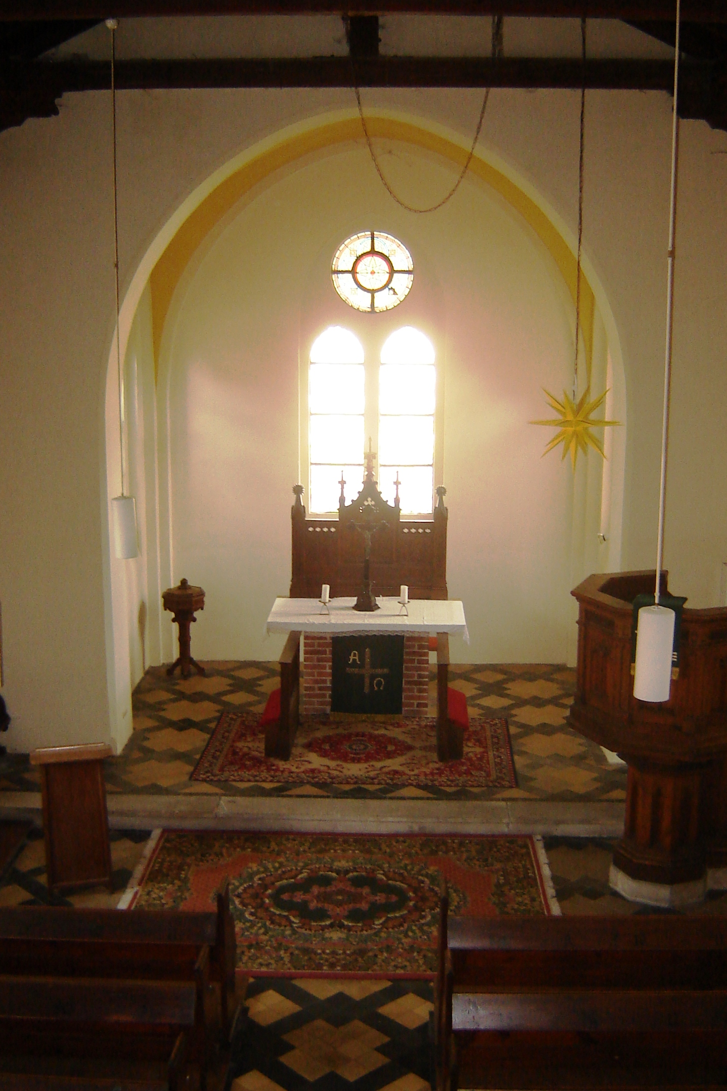 St.-Stephan-Kirche in Bördeland-Zens, Altarraum